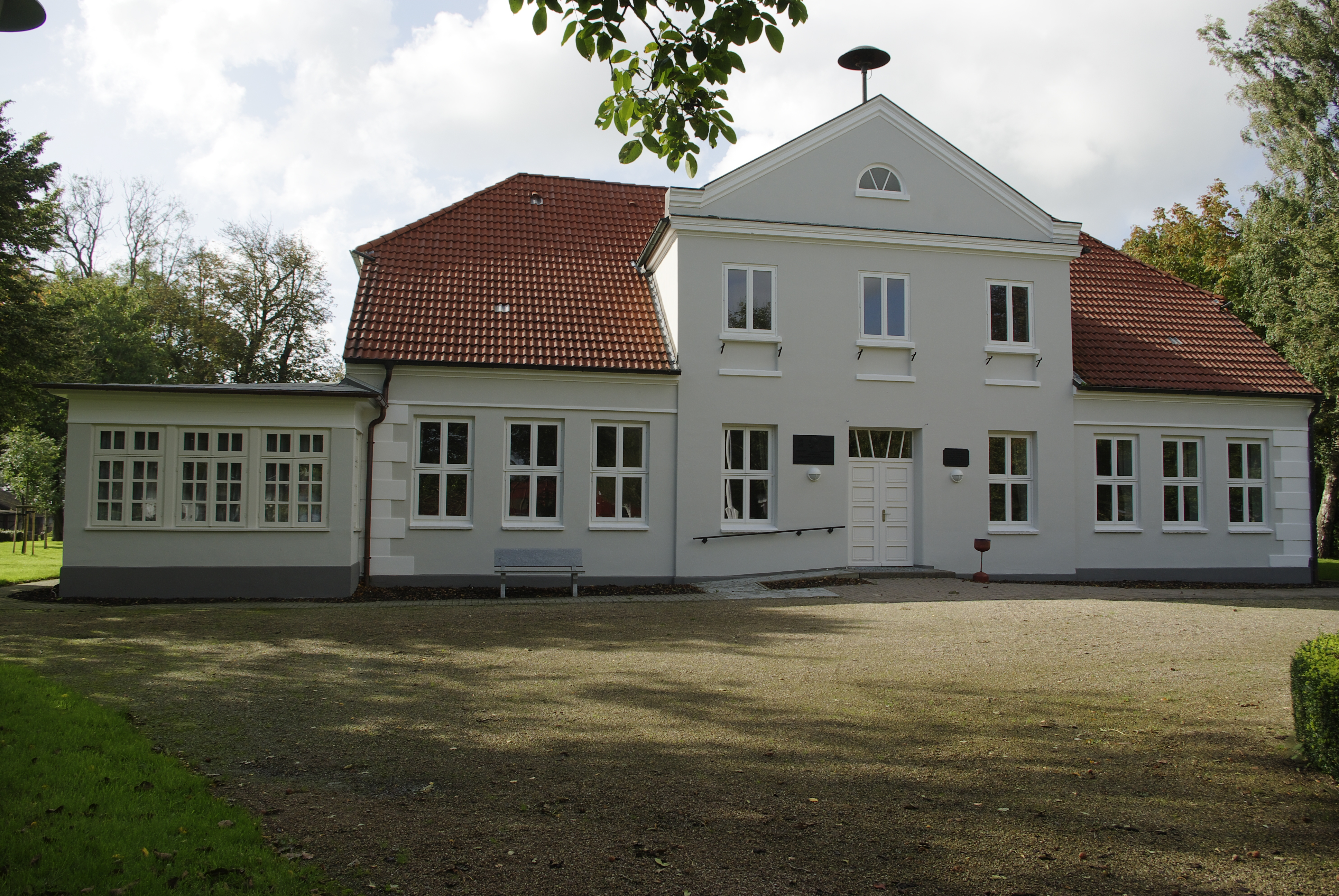 Kulturdenkmale in Meggerdorf Nummer 1 Zähler 1